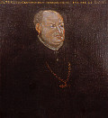 Graf Wilhelm der IV von Henneberg Schleusingen (1478-1559)∞ Anastasia von Brandenburg, Regent seit 1496